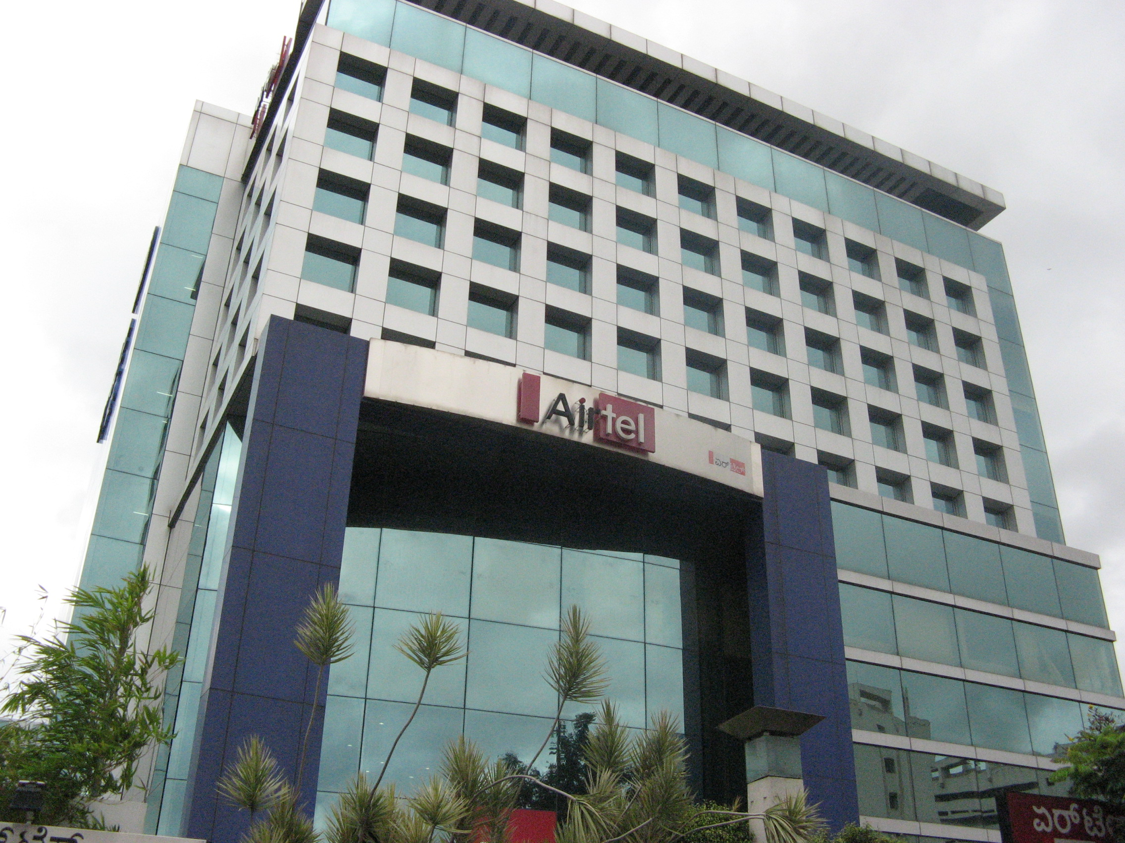 ബാംഗളൂർ ബെന്നാർഗട്ട റോഡിലെ എയർടെൽ ഓഫീസ്